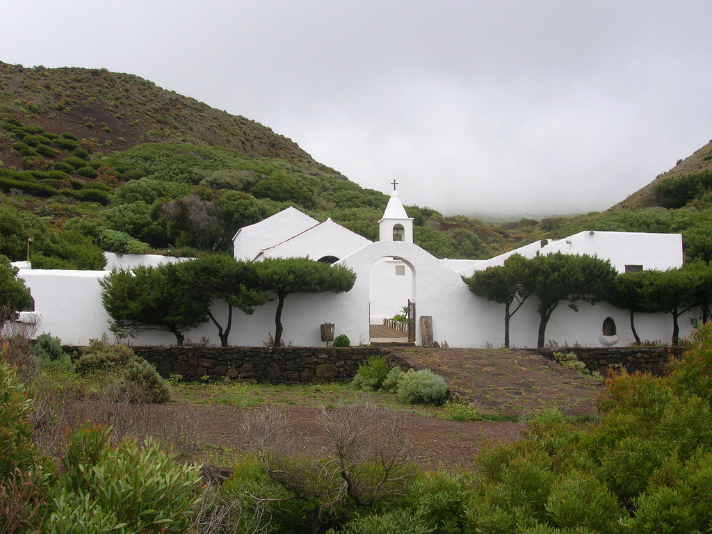 Ermita de la Virgen de los Reyes, El Hierro